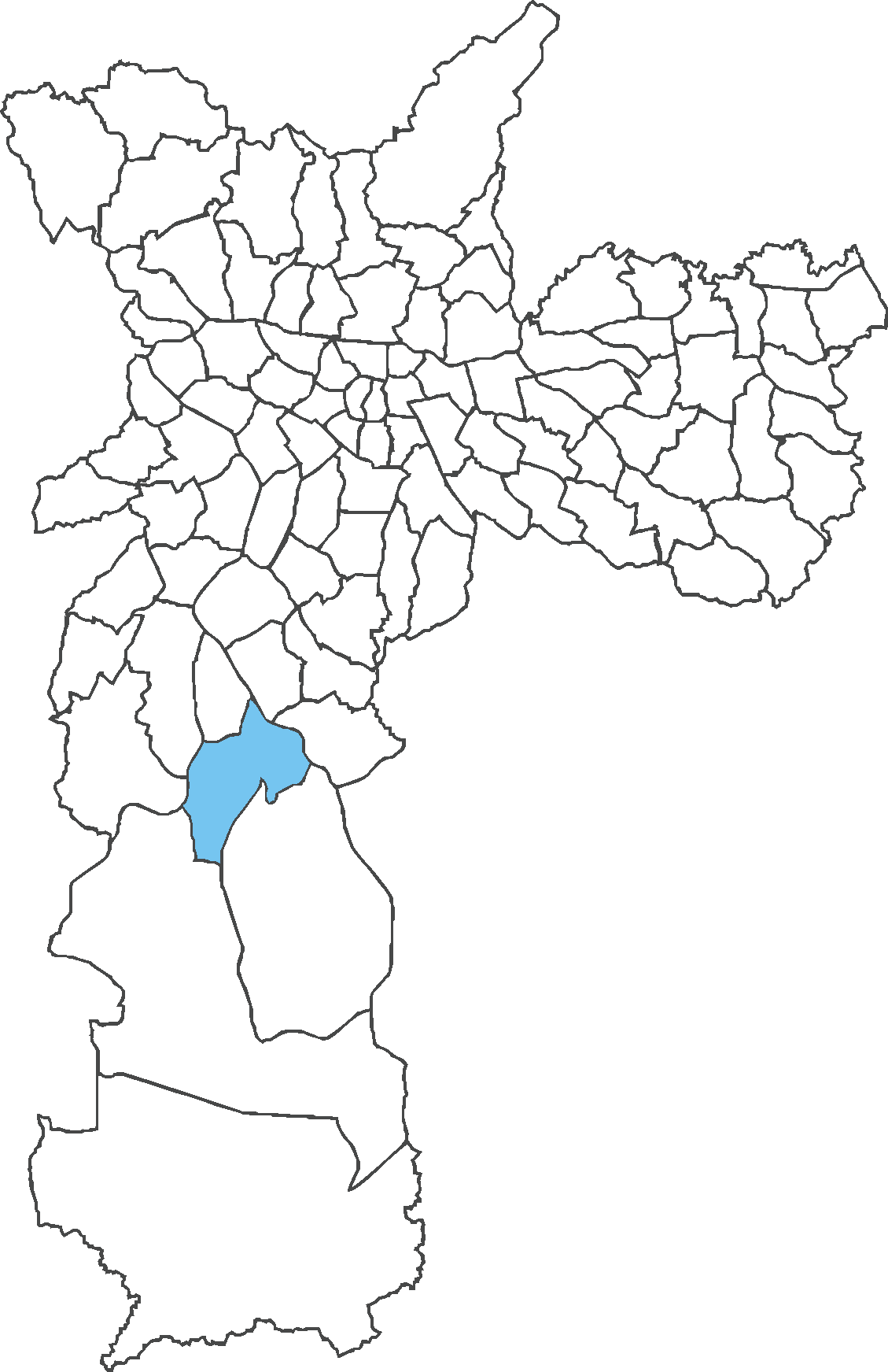 Localização do distrito de Cidade Dutra no município de São Paulo.